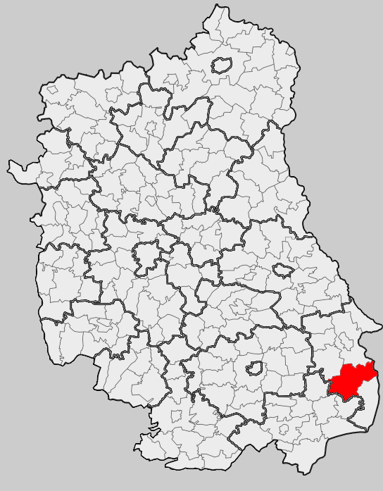 Map of gmina Mircze, Hrubieszów county, Lublin voivodship Mapa gminy Mircze, powiat hrubieszowski, województwo lubelskie